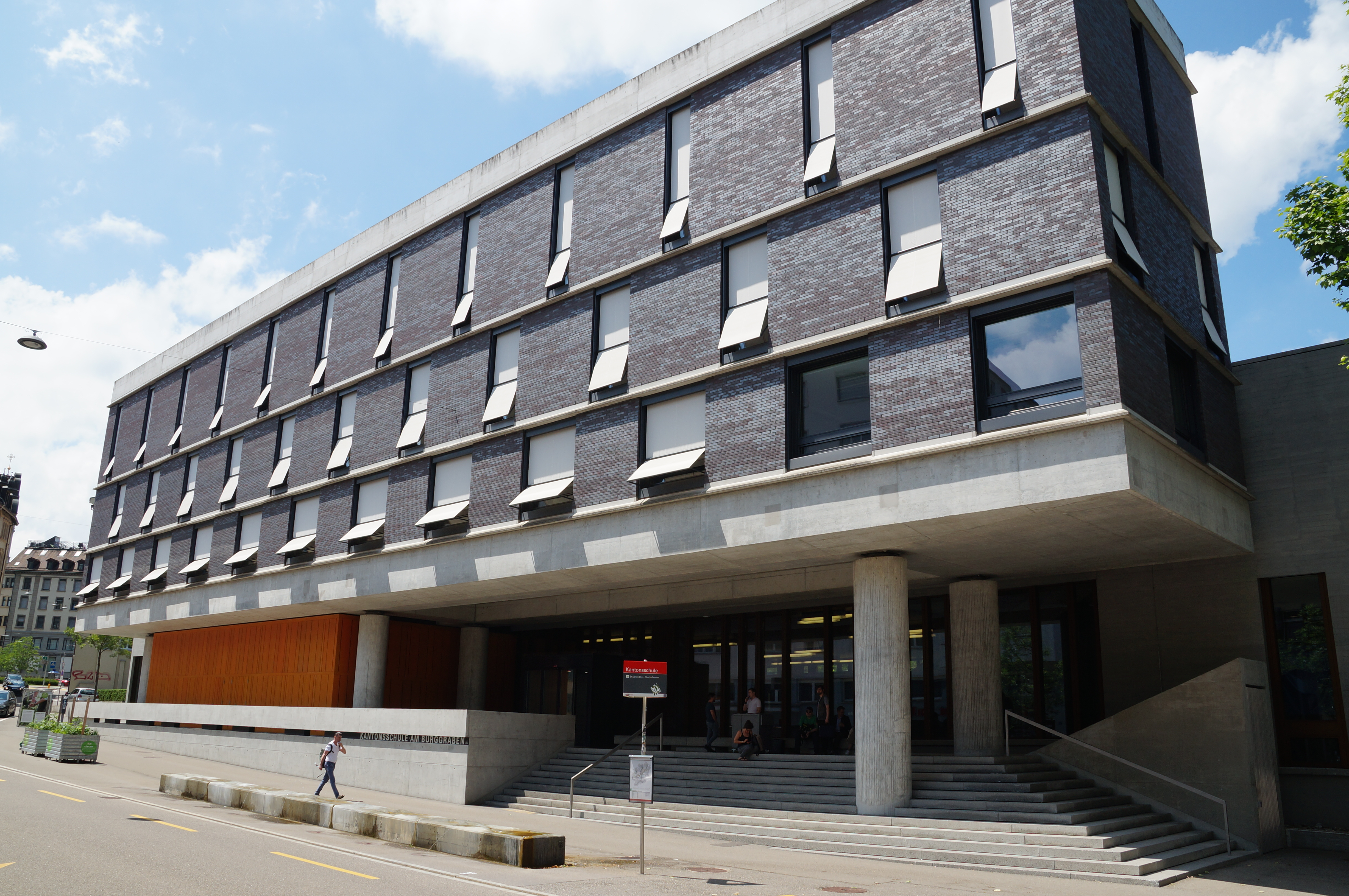 Kantonsschule am Burggraben, St. Gallen – Seite Lämmlisbrunnenstrasse